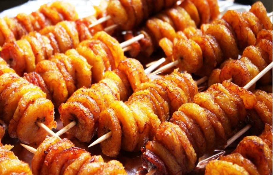 Frites de bananes plantain mûres disposées sur des pics à brochette This is an image of food from Côte d'Ivoire